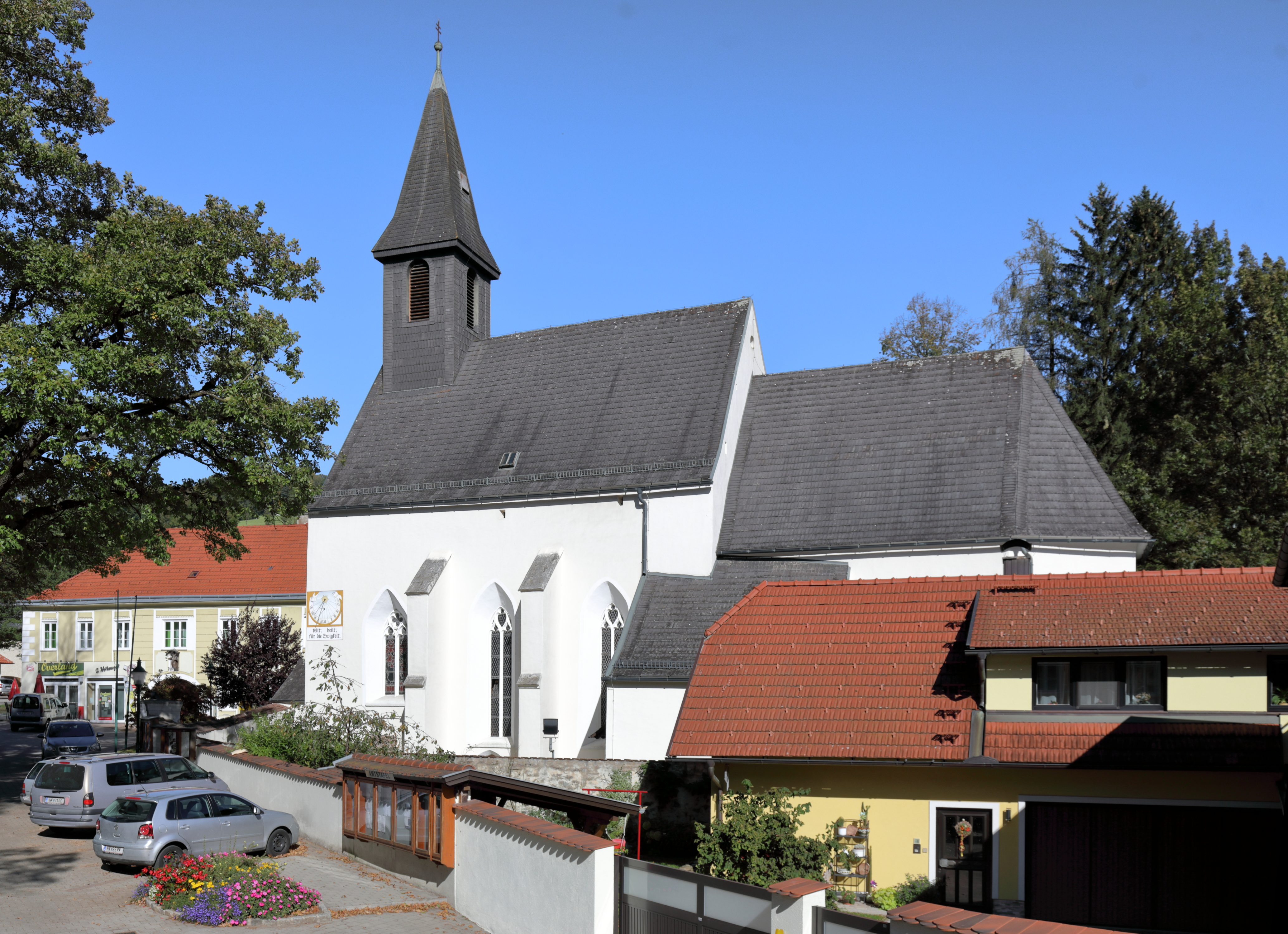 Südsüdostansicht der röm.-kath. Pfarrkirche hl. Ulrich in der niederösterreichischen Gemeinde Feistritz am Wechsel.Die spätgotische Wehrkirche hat eine vorwiegend barocke Einrichtung. 1972 wurde an der Chorsüdwand ein Fresko aus dem 2. Viertel des 14. Jahrhunderts freigelegt.